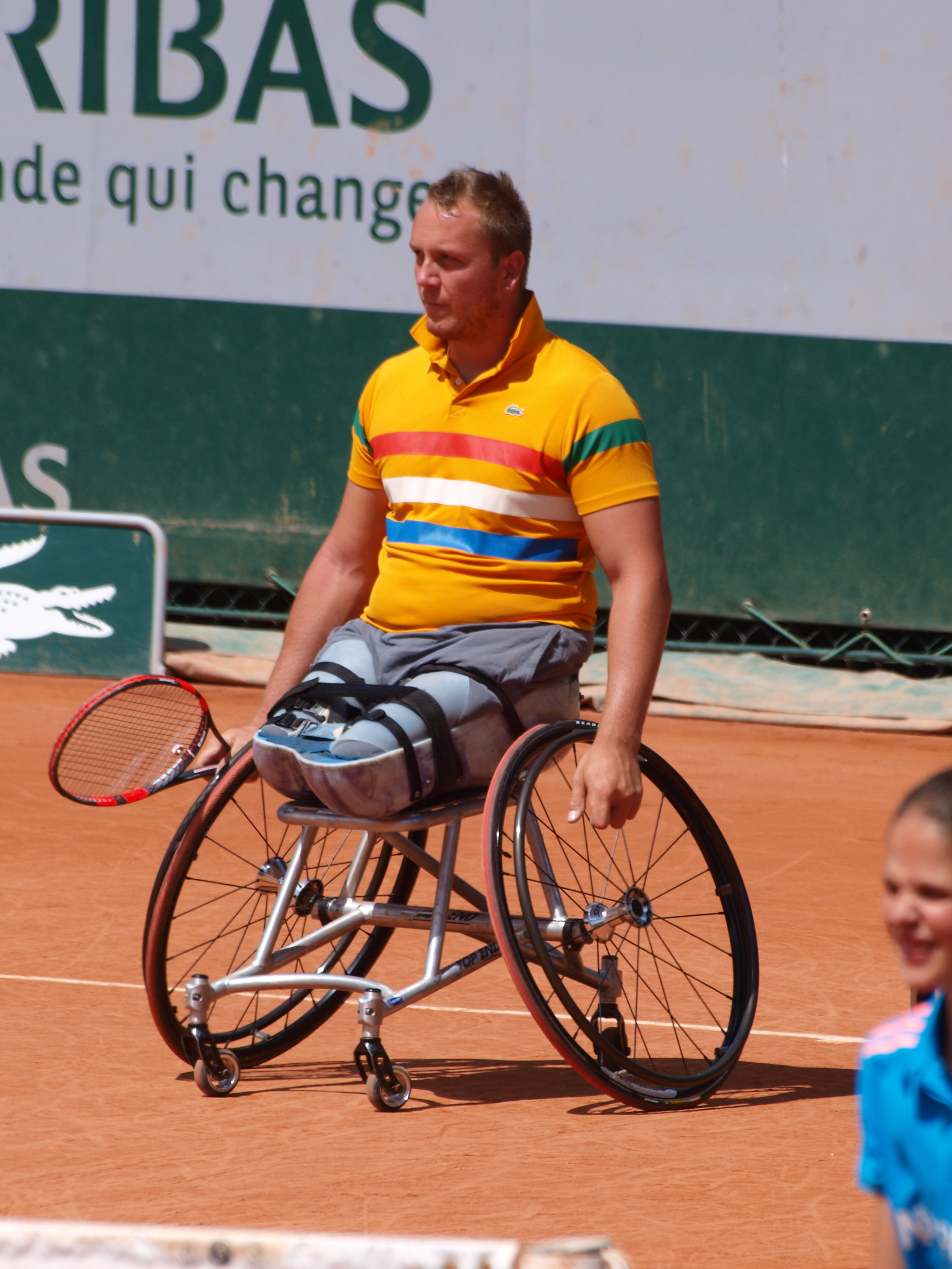 Internationaux de France de tennis, le 5 juin 2014 : démonstration handisport avec handicapés et valides mêlés, sous le patronage de Jean Gachassin, président de la FFT.